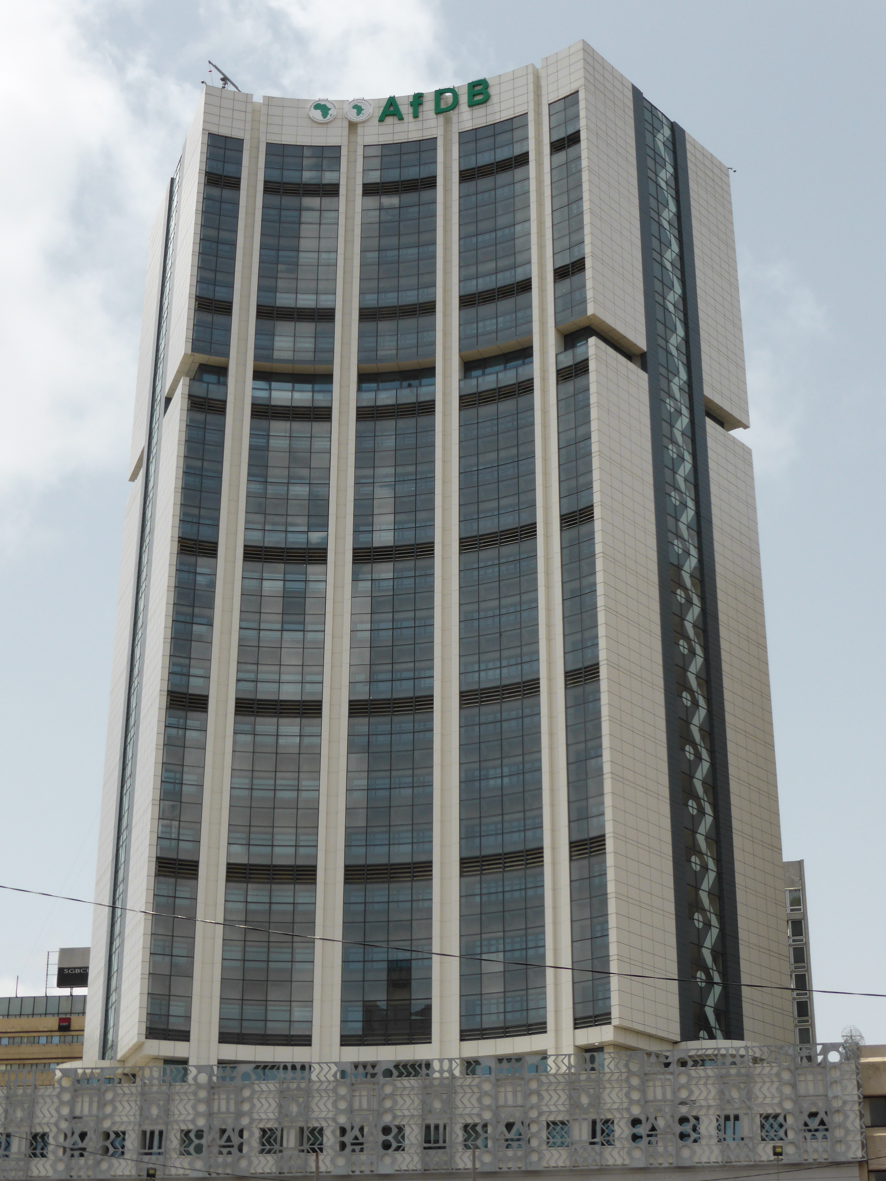 Le siège de la banque africaine de développement au plateau à Abidjan